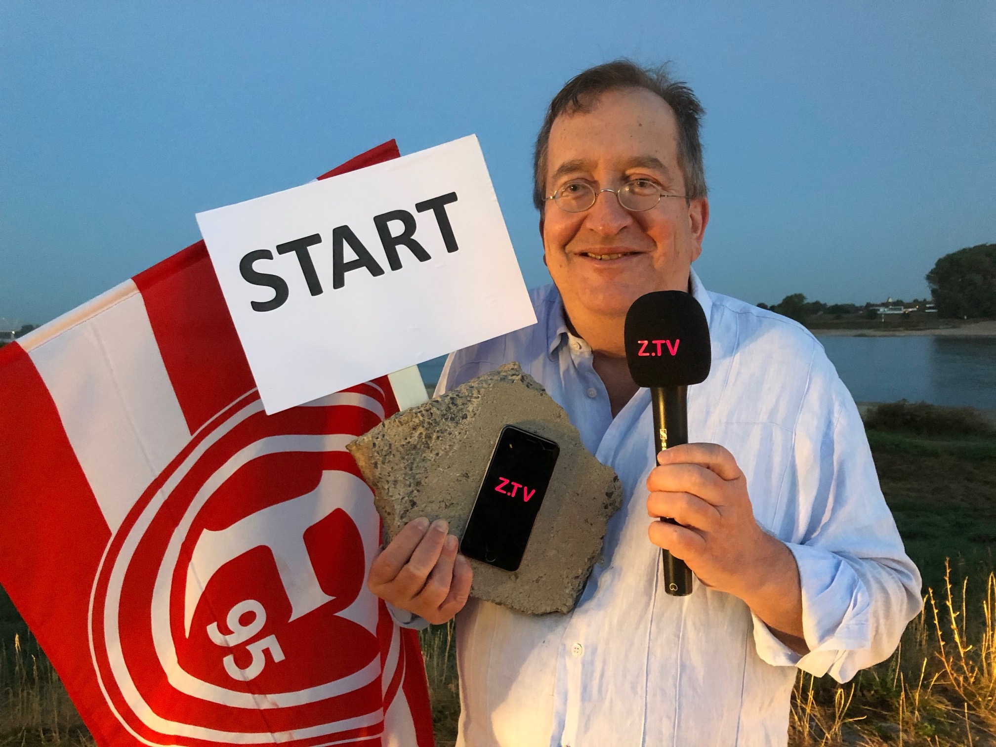 Andre Zalbertus beim Start von Zalbertus TV